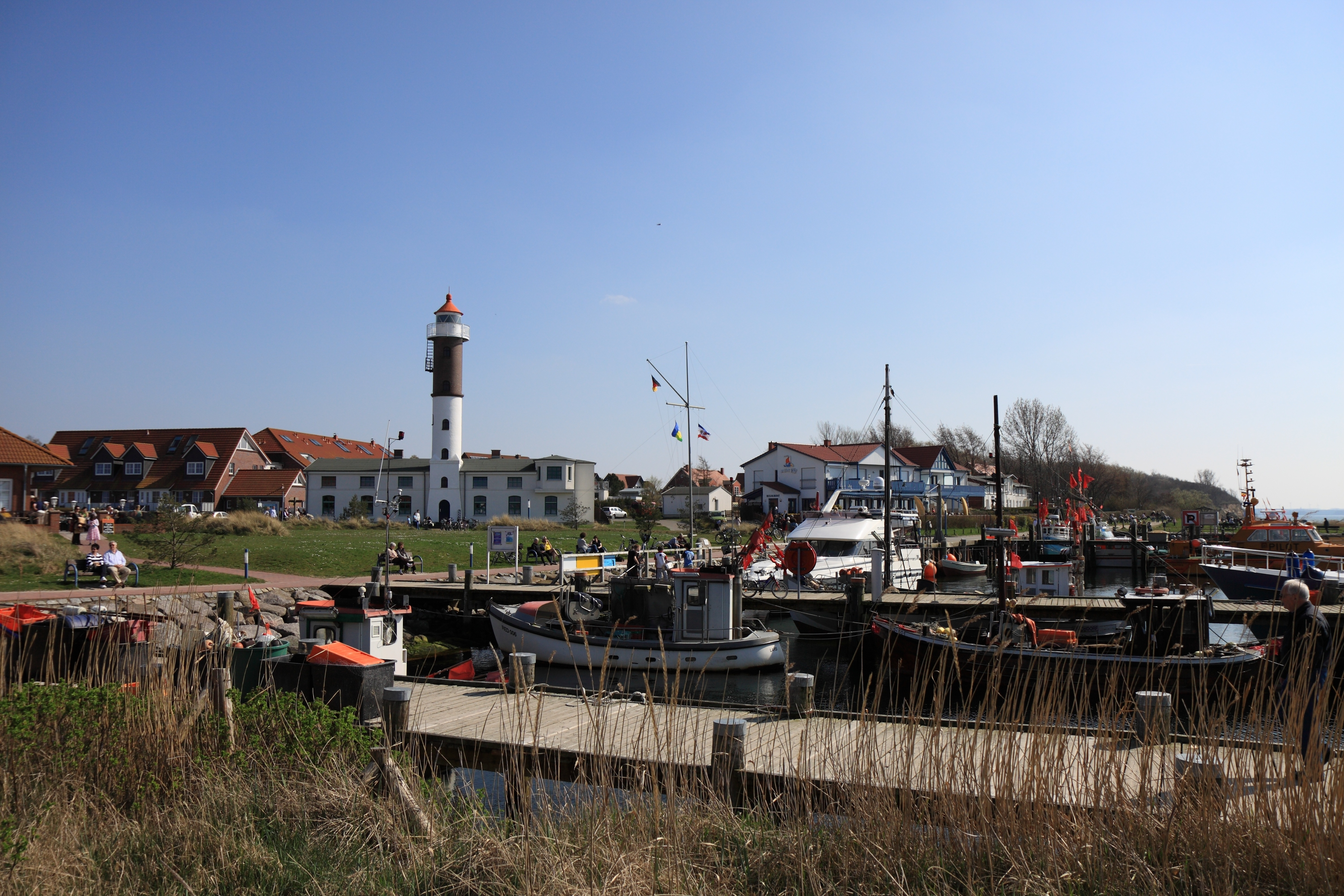 Insel Poel - Timmendorf Strand